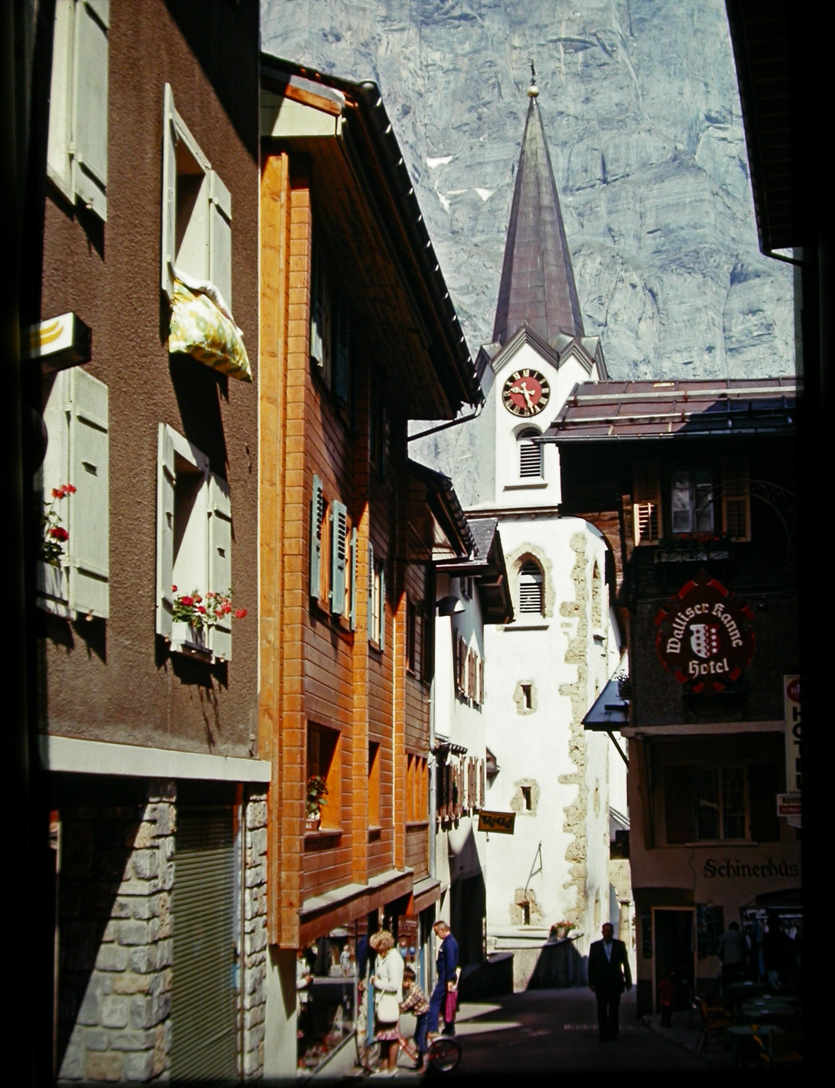 Leukerbad Ansichten: Kirchstrasse